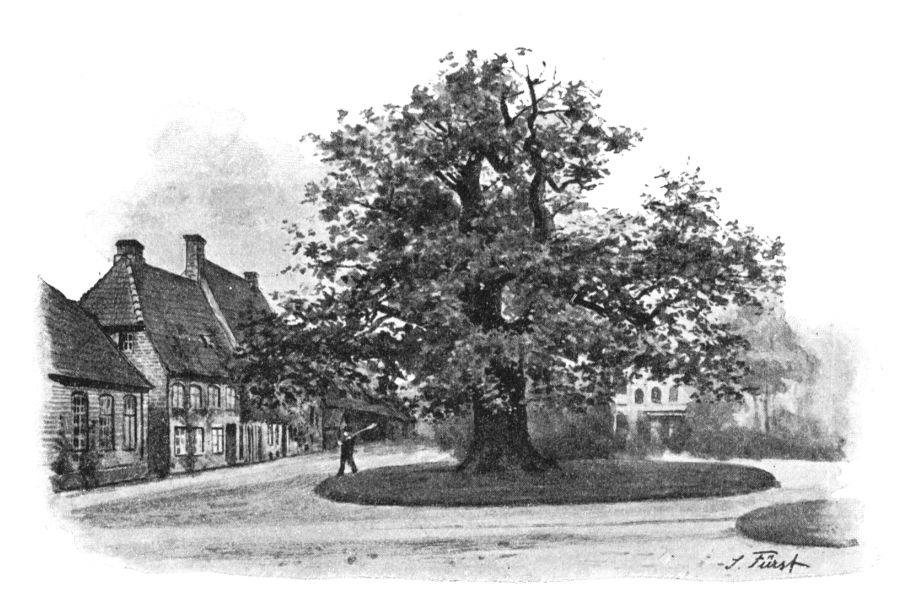 Das Kloster Preetz um 1895 gezeichnet von Julius Fürst